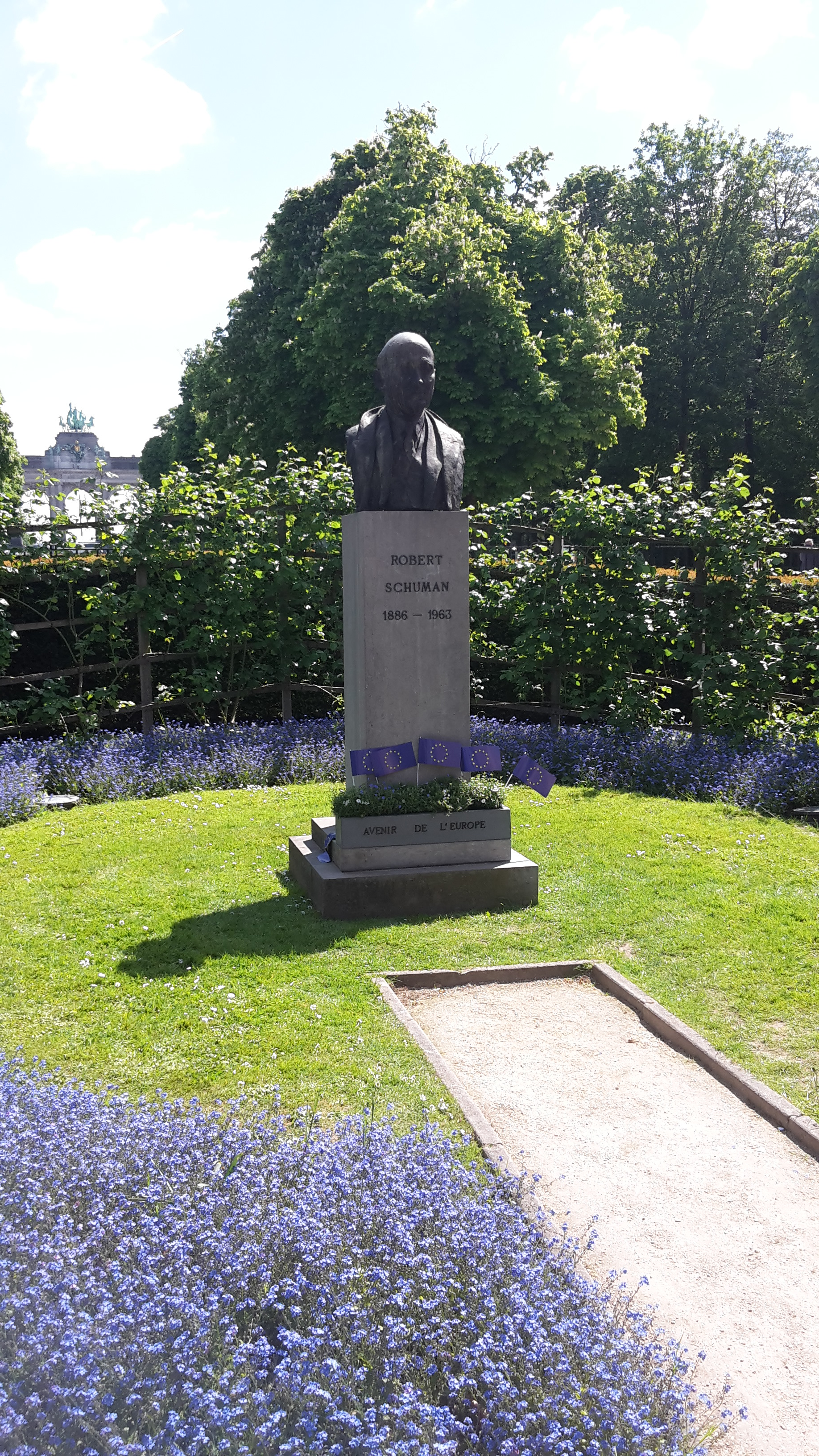 Busto di Robert Scuman nel Parco del Cinquantenario a Bruxelles